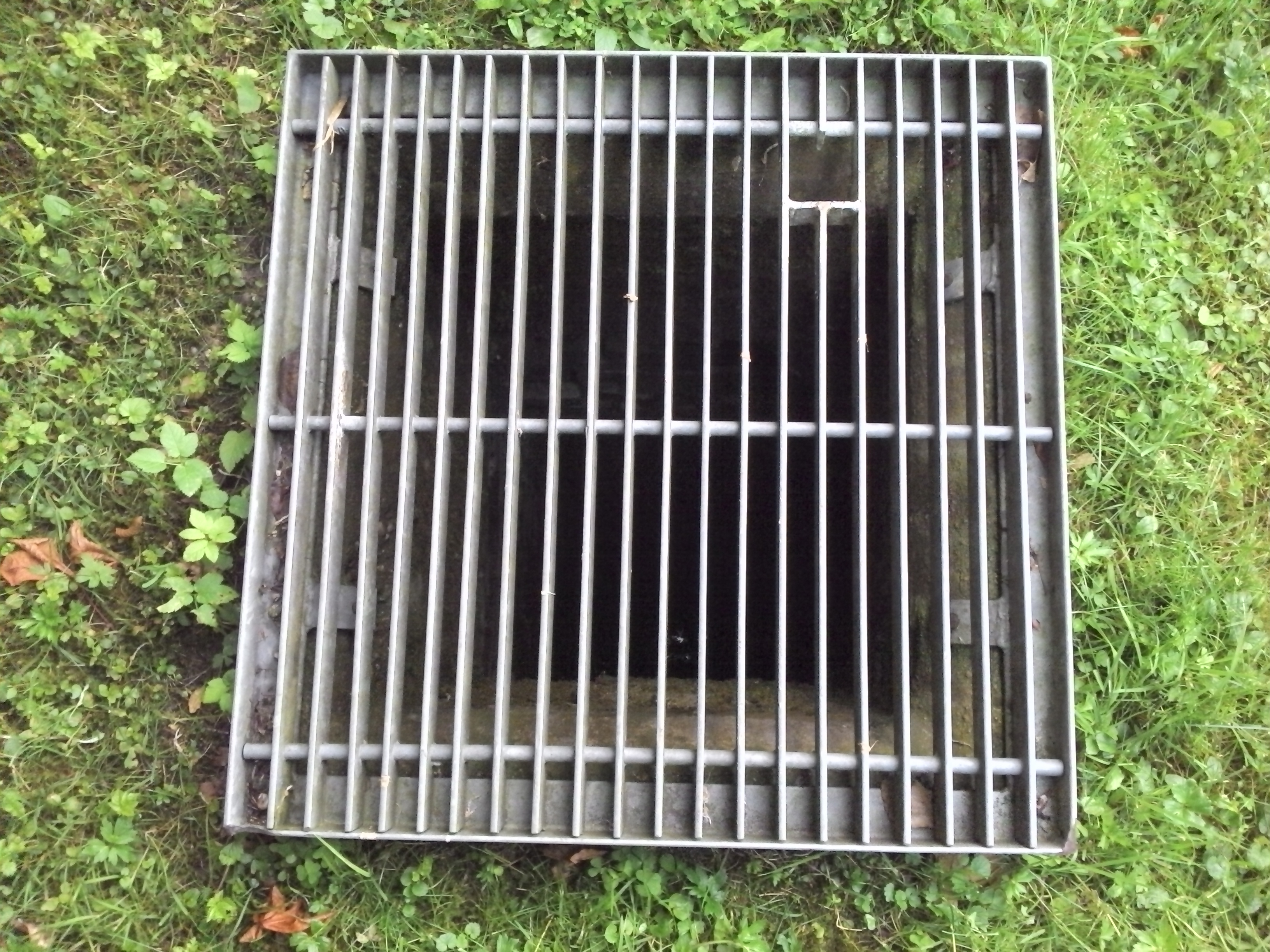 Bierkeller beim Schloss Thalhausen (Kranzberg). Blick auf einen Lüftungsschacht. Größe ca. 50x50 cm. Siehe auch thumb|Bierkeller beim Schloss Thalhausen (Kranzberg).